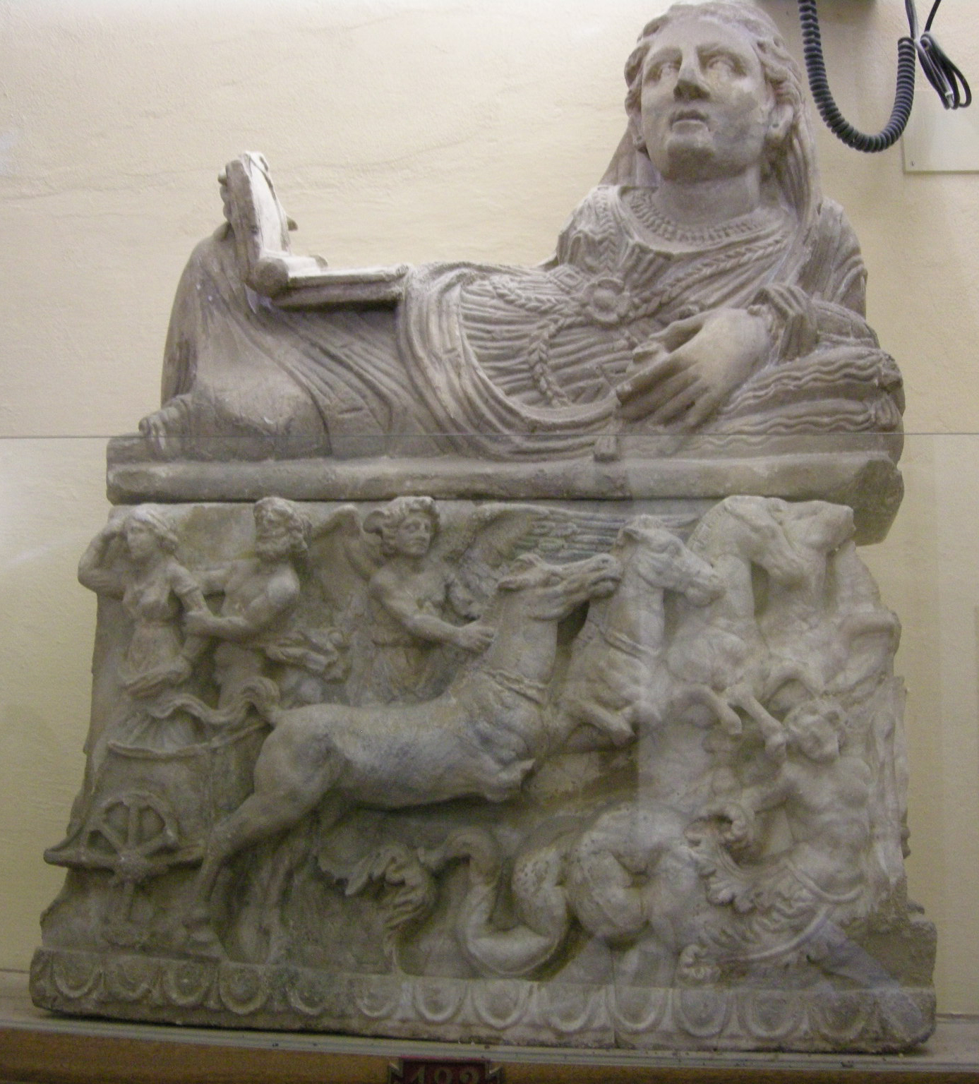 Museo guarnacci, urnetta etrusca seconda serie